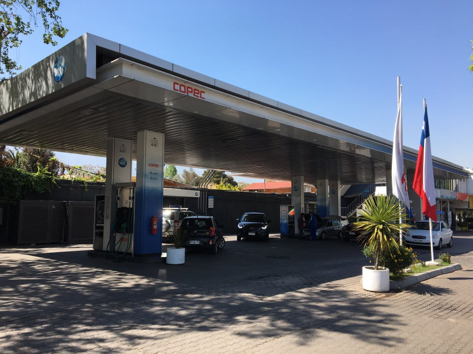 Copec Ñuñoa